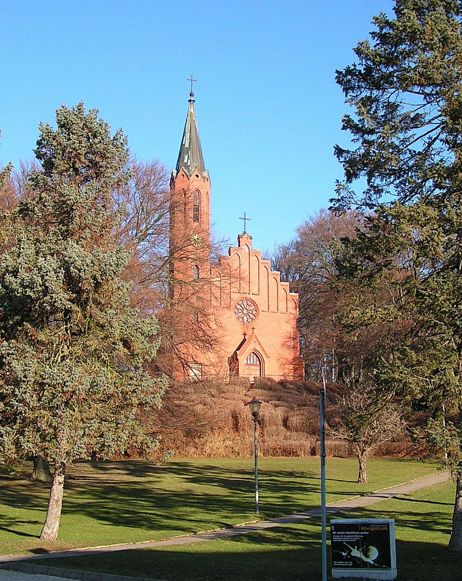 Ev. Kirche in Sassnitz